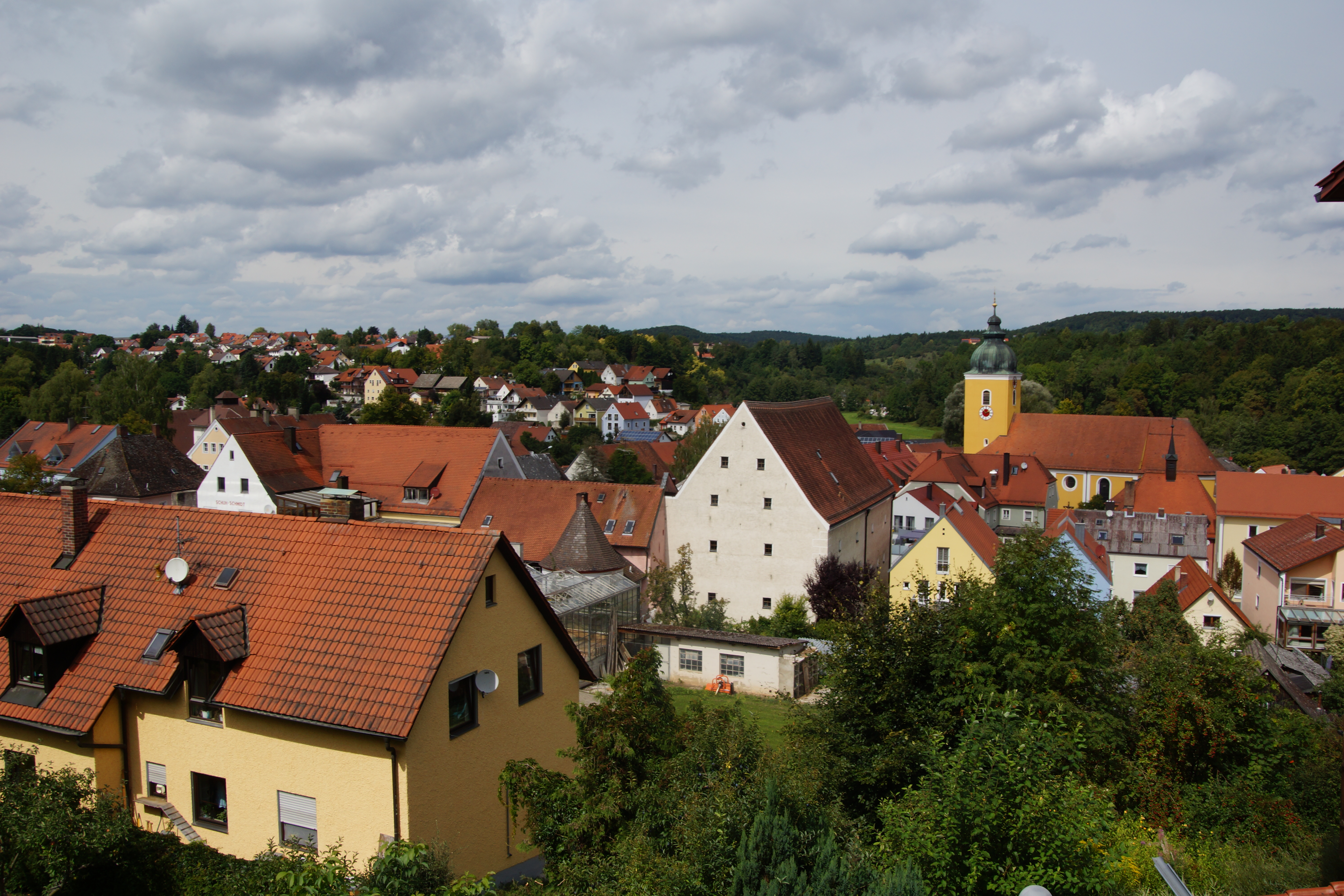 Der Markt Beratzhausen in der Oberpfalz